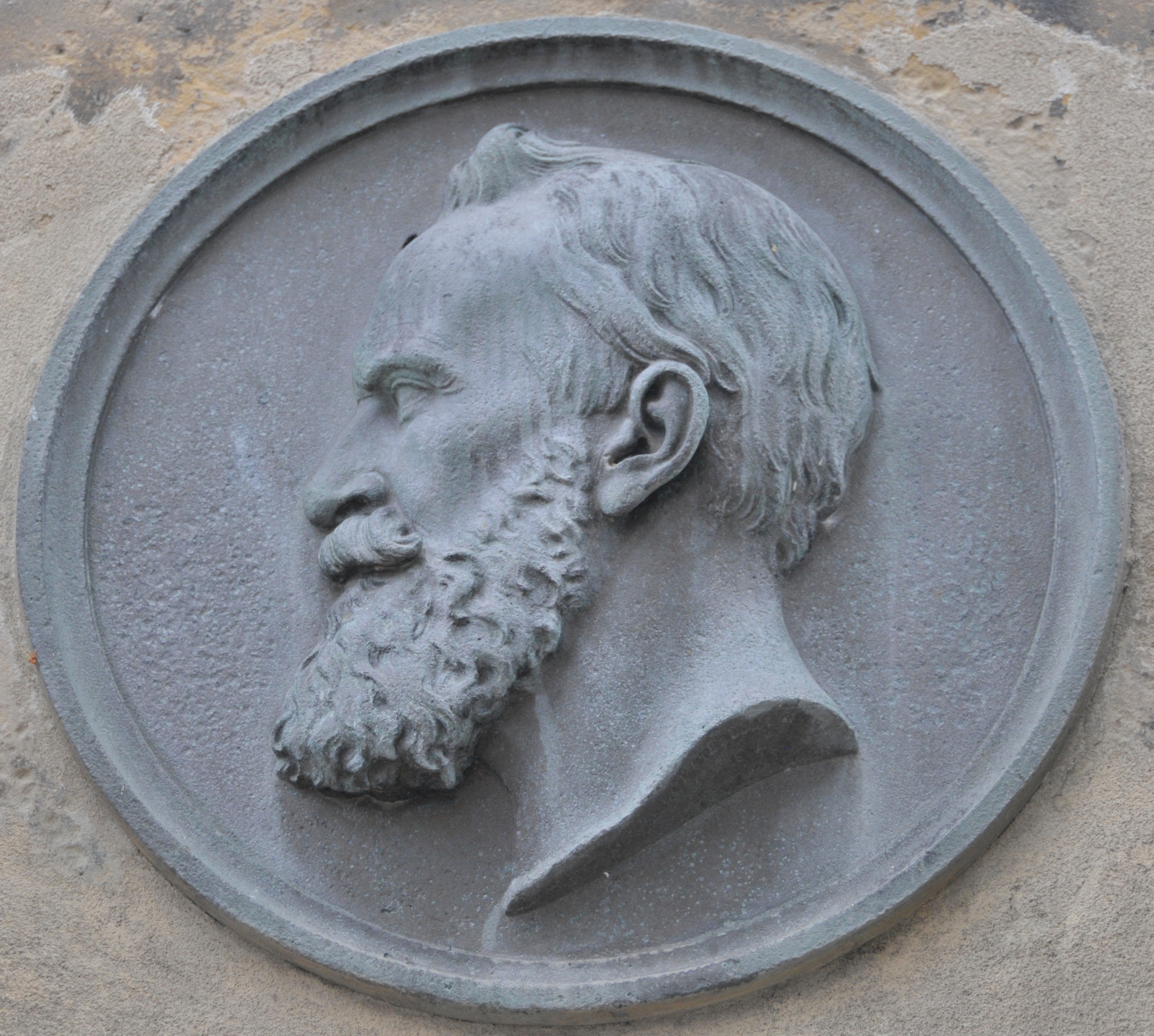 Porträt von Paul Emil Jacobs auf einer Stele in Gotha